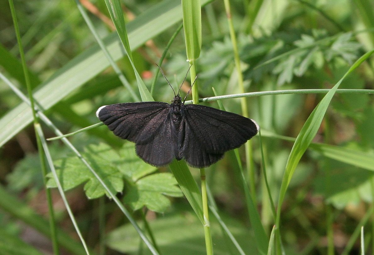 Odezia atrata in Réserve naturelle of Labergement 21 France